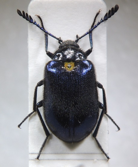 中文（台灣）: 臺灣靛青斑蕈甲